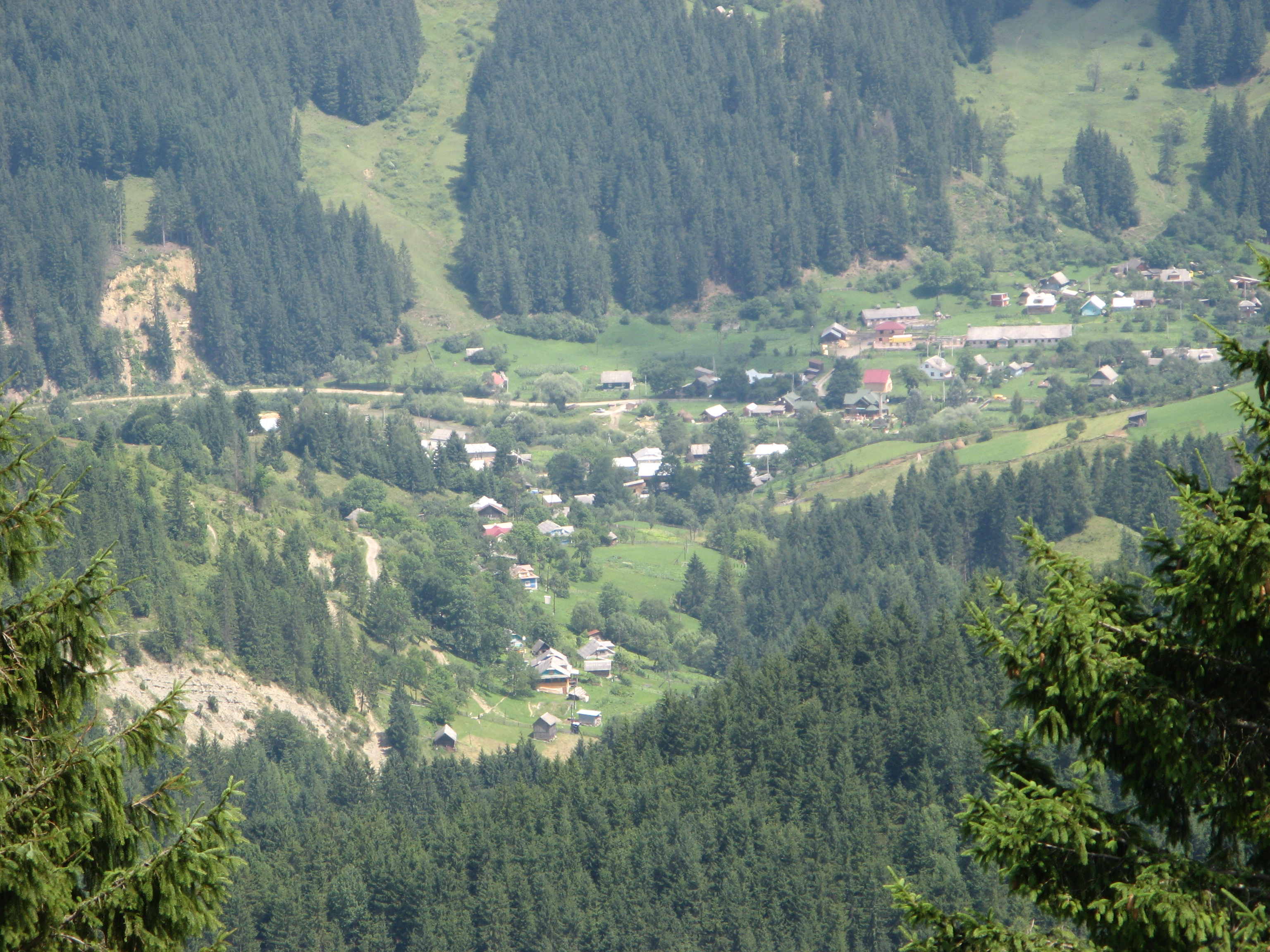 с. Стебні (Путильський р-н), с. Стебні (Верховинський р-н)